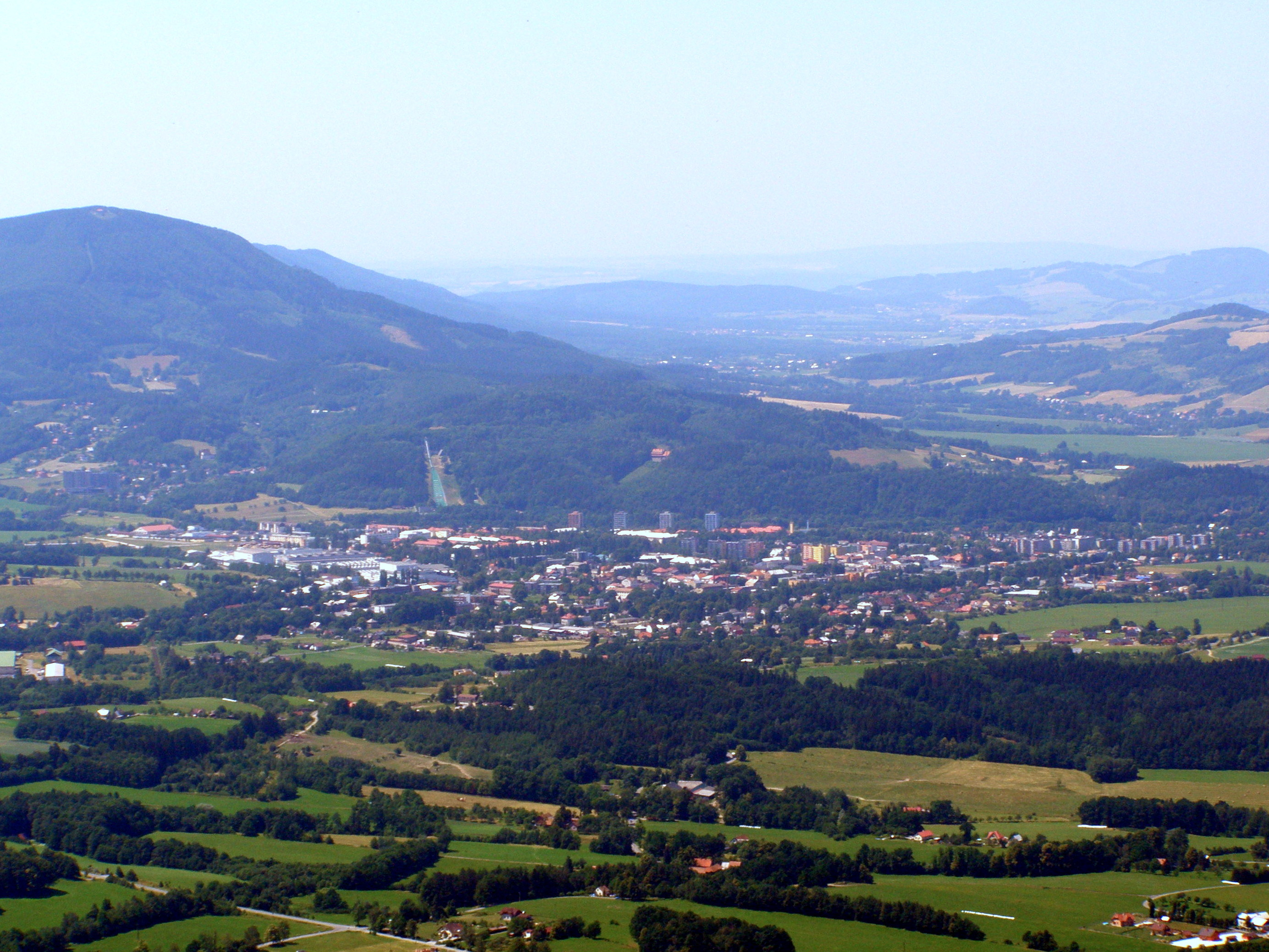 Frenštát pod Radhoštěm, pohled ze Skalky